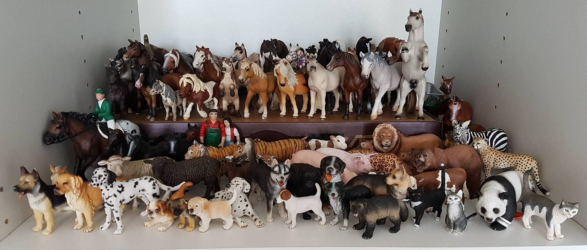 Schleich eläimiä